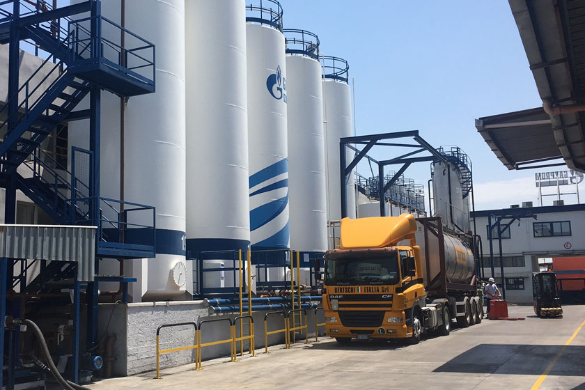 Фото с официального сайта ООО "Газпромнефть - Смазочные материалы", иллюстрирующее деятельность компании. Завод в Бари (Италия)